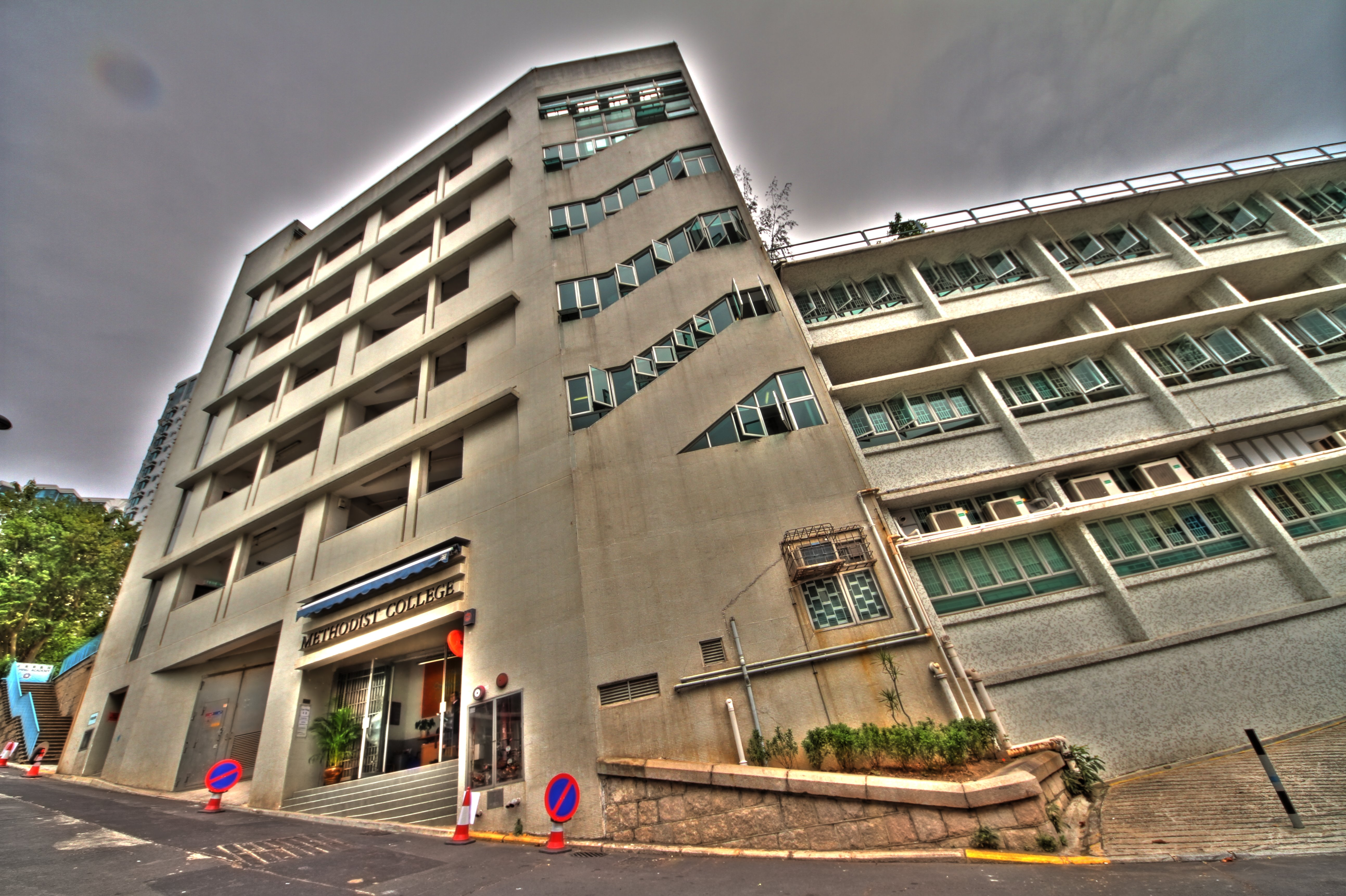 香港循道中學